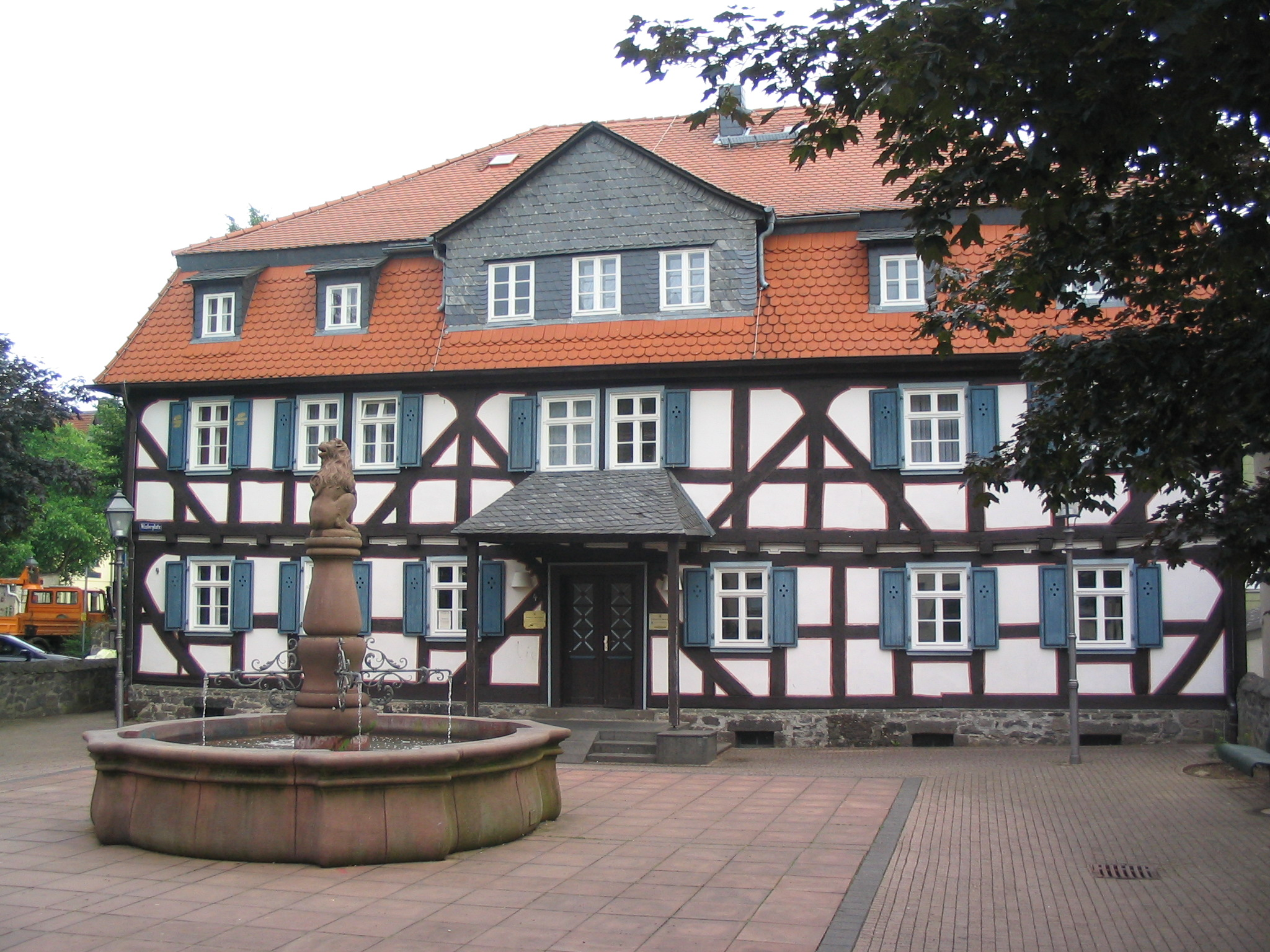 Grünberg, Germany communal brewery. (build 18th century, renovated 1920) // Städtisches Brauhaus Grünberg, Hessen (gebaut 18. Jahrhundert, umgebaut 1920)